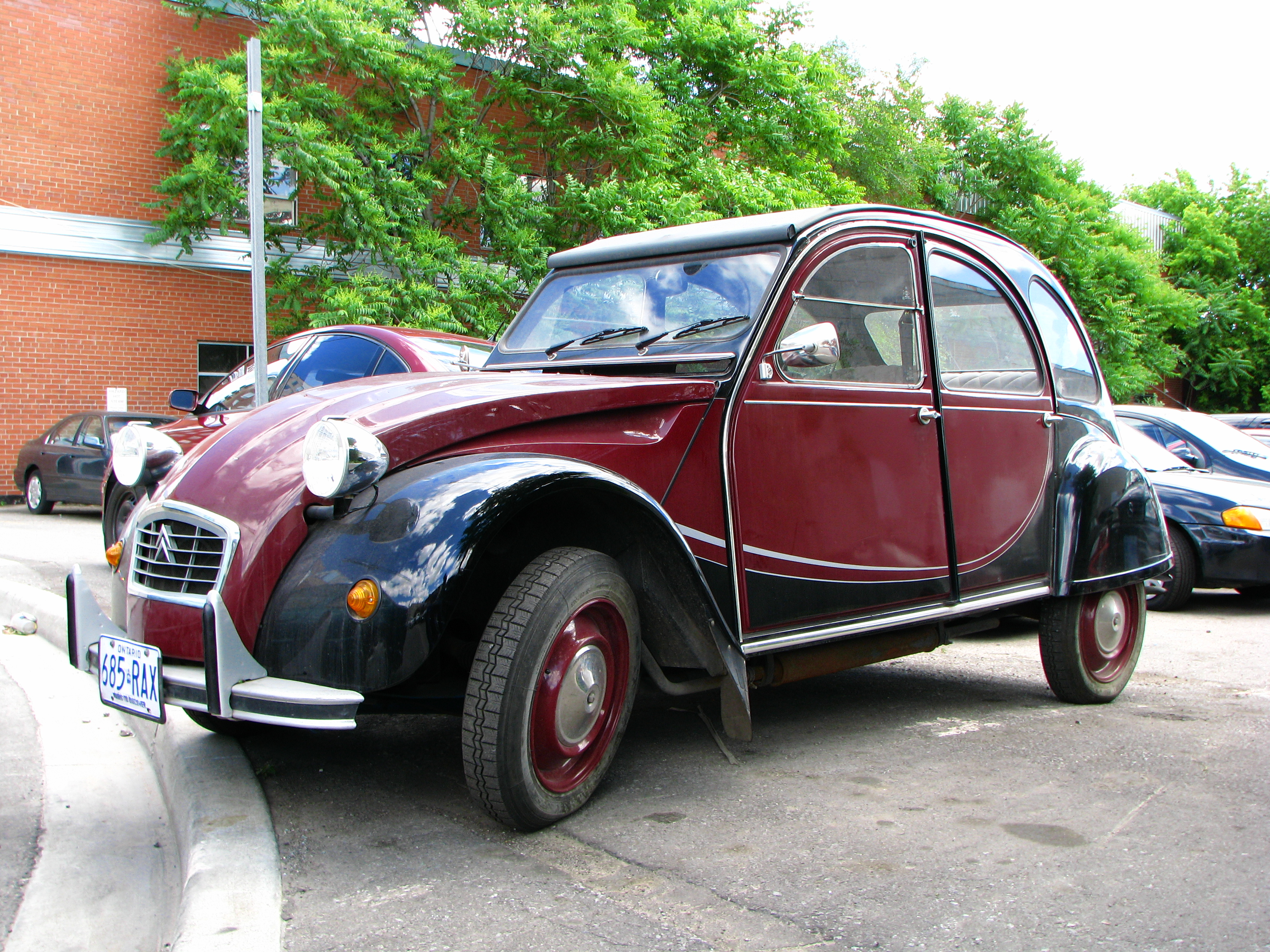 2cv charlston bordó / fekete